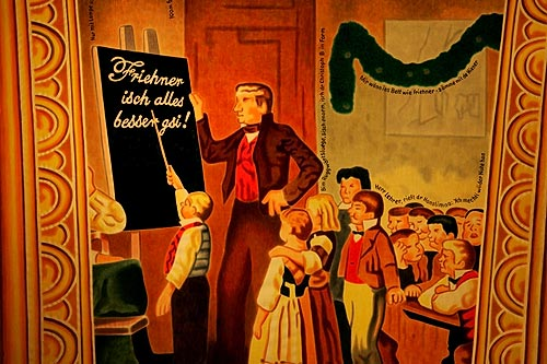 Basler Fasnacht 05: Ladäärne-Uustellig (Münsterplatz)